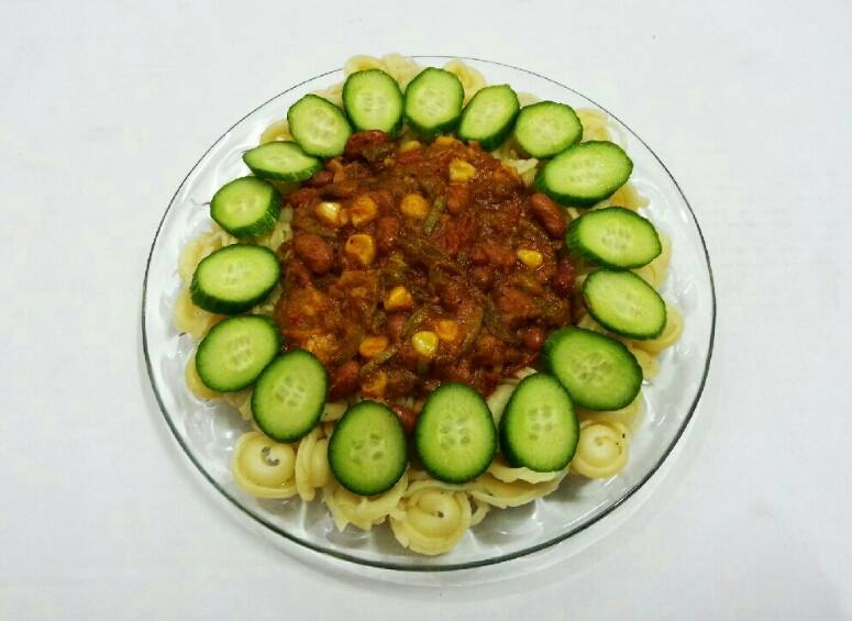 محتویات این غذا پاستا، کدو، لوبیاچیتی، گوجه، رب گوجه، نخود سبز، فلفل سبز، ذرت، سرکه خرما، آبغوره، آبلیمو، گرد لیمو، فلفل قرمز، فلفل سیاه، خیارسبز، نمک و آب بوده که هیچ کدام حیوانی و یا از اندام های حیاتی گیاهان مانند ریشه، ساقه و برگ نیستند.